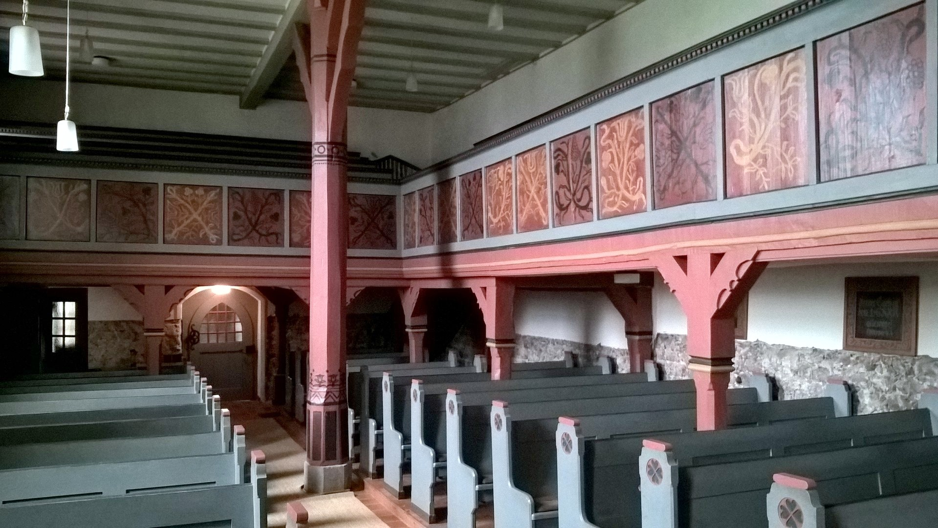 Evangelische Kirche Stangenrod, Grünberg, Landkreis Gießen, Hessen, Deutschland